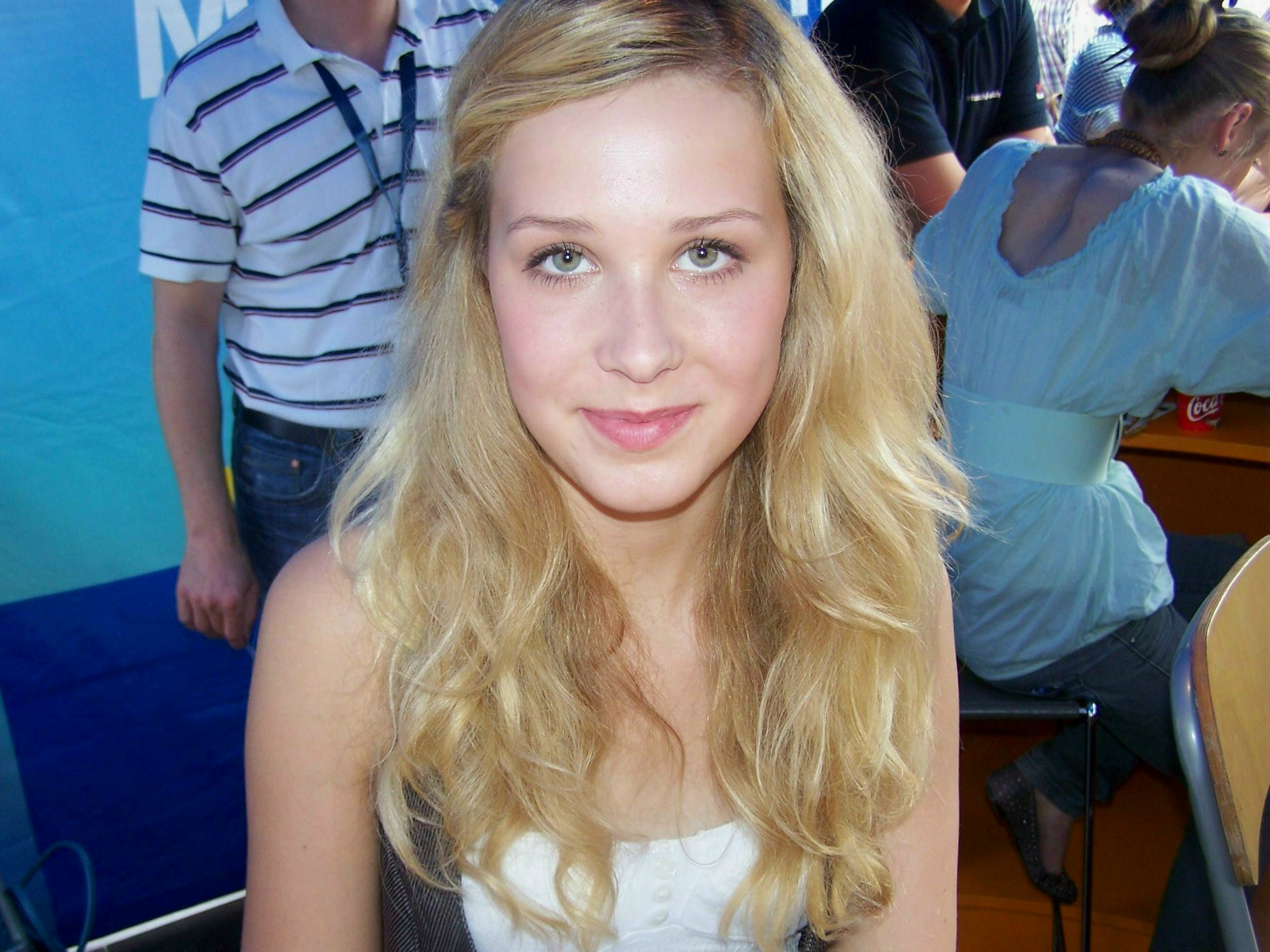 Auf dem Bild ist Clara Dolny zu sehen.Sie war am 28.06.2009 auf dem NRW-Tag in Hamm zu Gast.